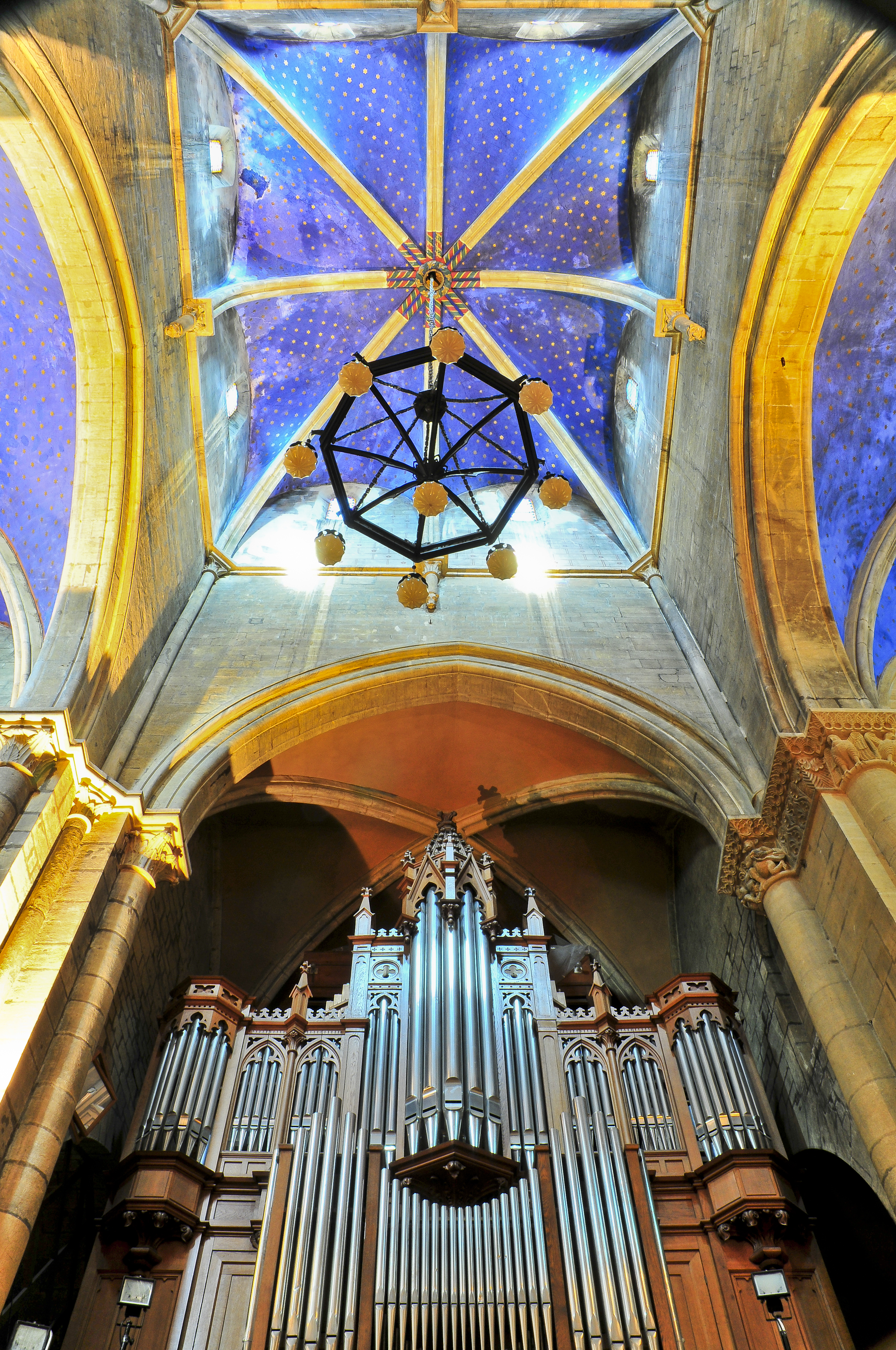 Neuchâtel, Collégiale de Neuchâtel